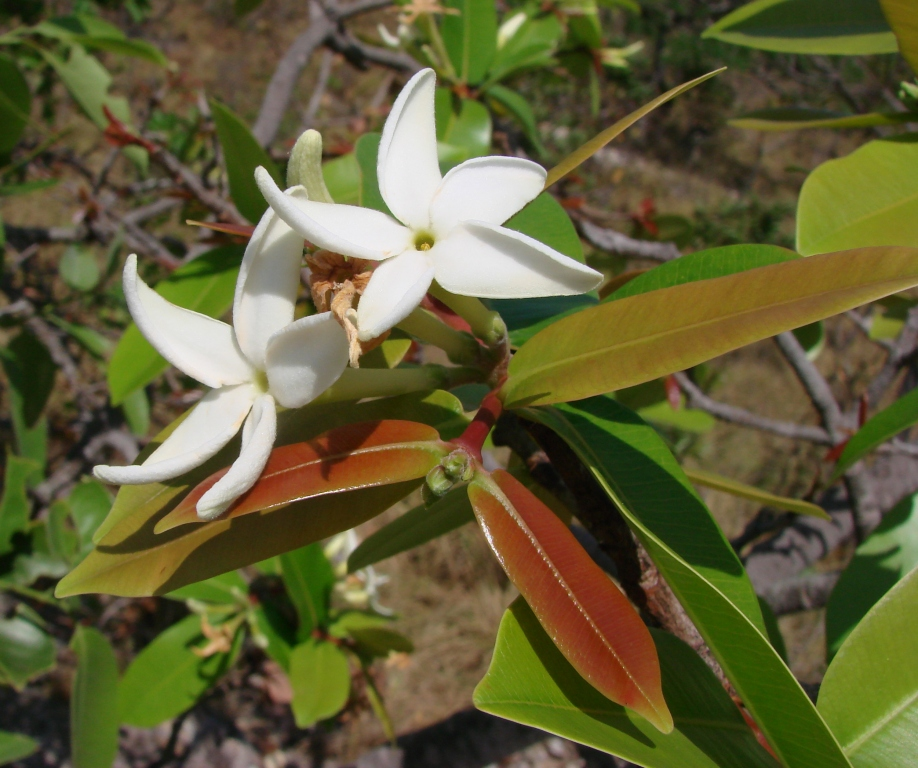 Hancornia speciosa - APOCYNACEAE - Jardim Botânico de Brasília - DF - Brasil